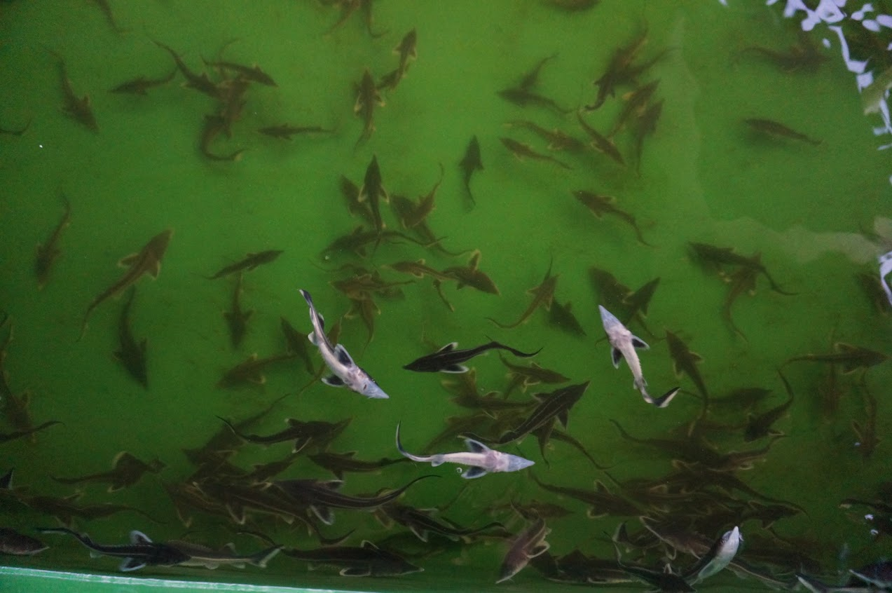 Подрощенная молодь стерляди на плавучем рыбоводном заводе, полуостров Копылово, Тольятти